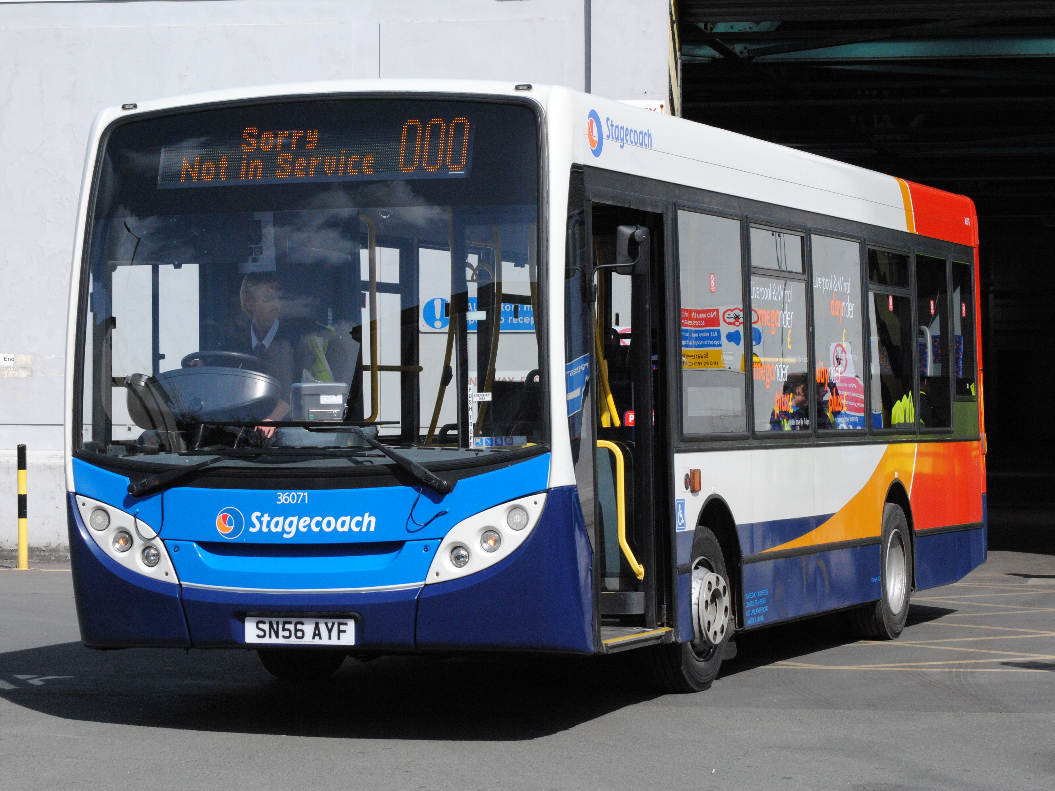 Alexander Dennis Enviro 200 Dart 8.9m. Seen here in Rock Ferry depot